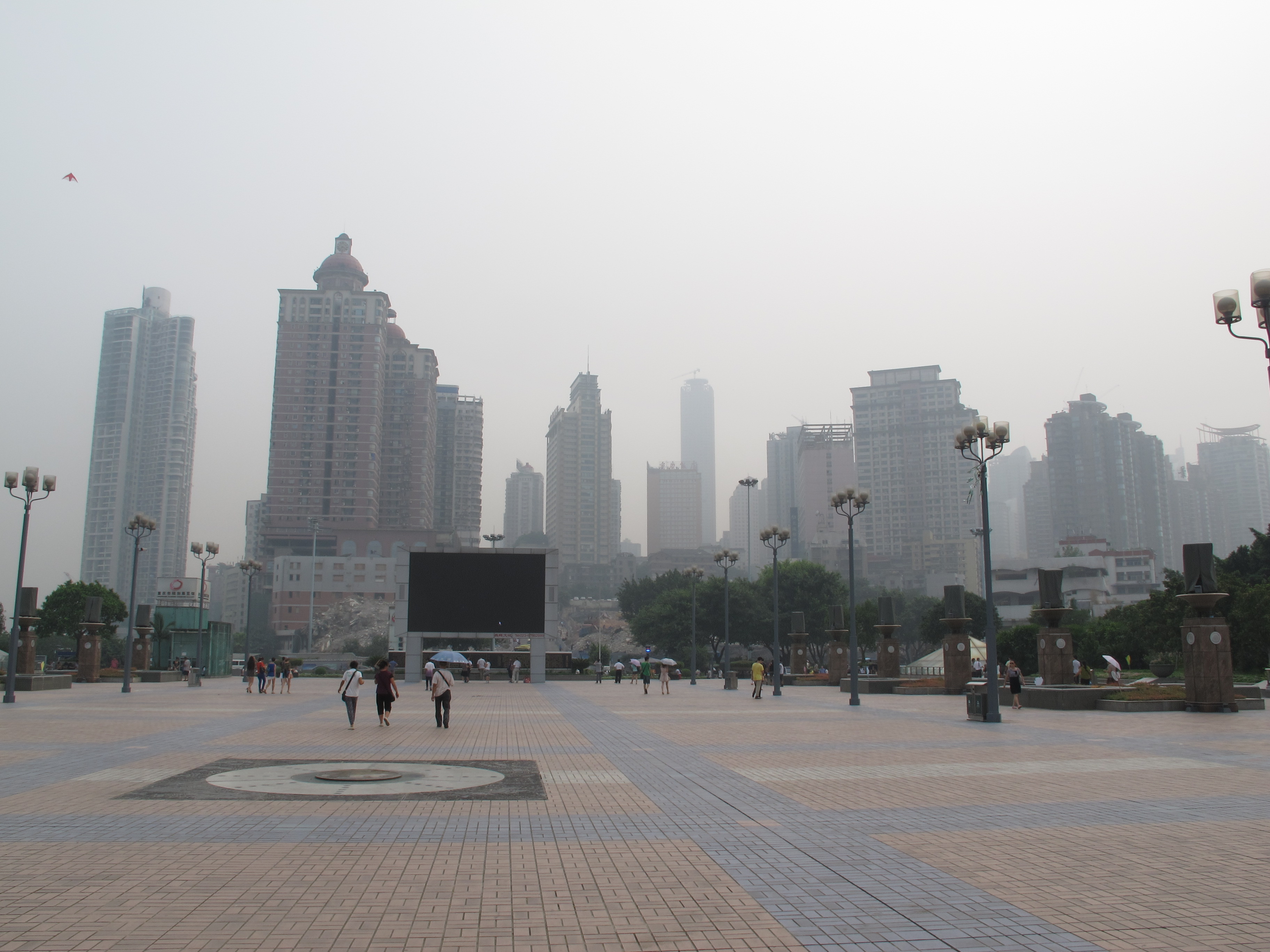 重庆新地标即将在这里建成